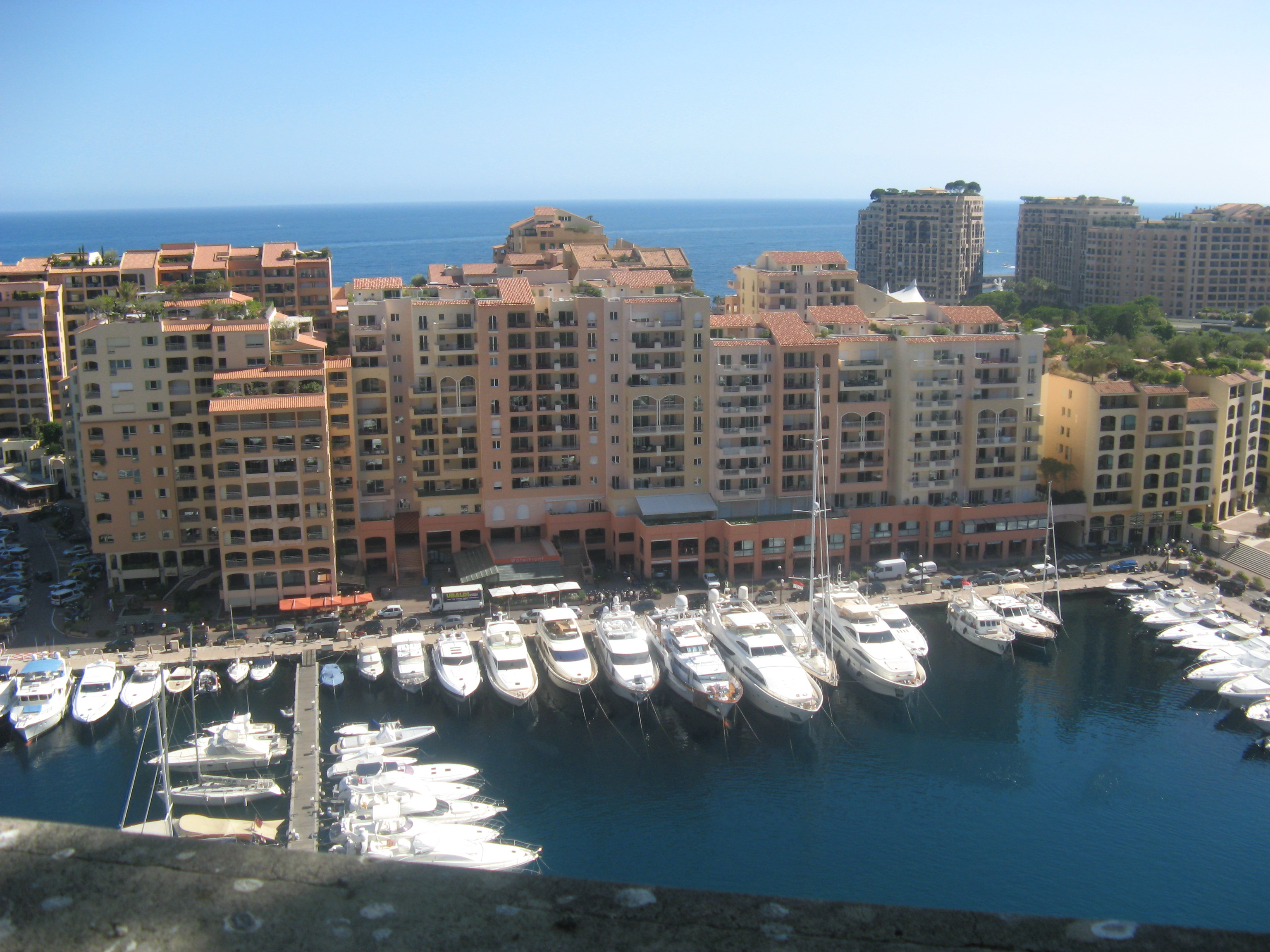 Immeubles d'habitation destinés aux Monégasques (Secteur domanial propriété de l'Etat)